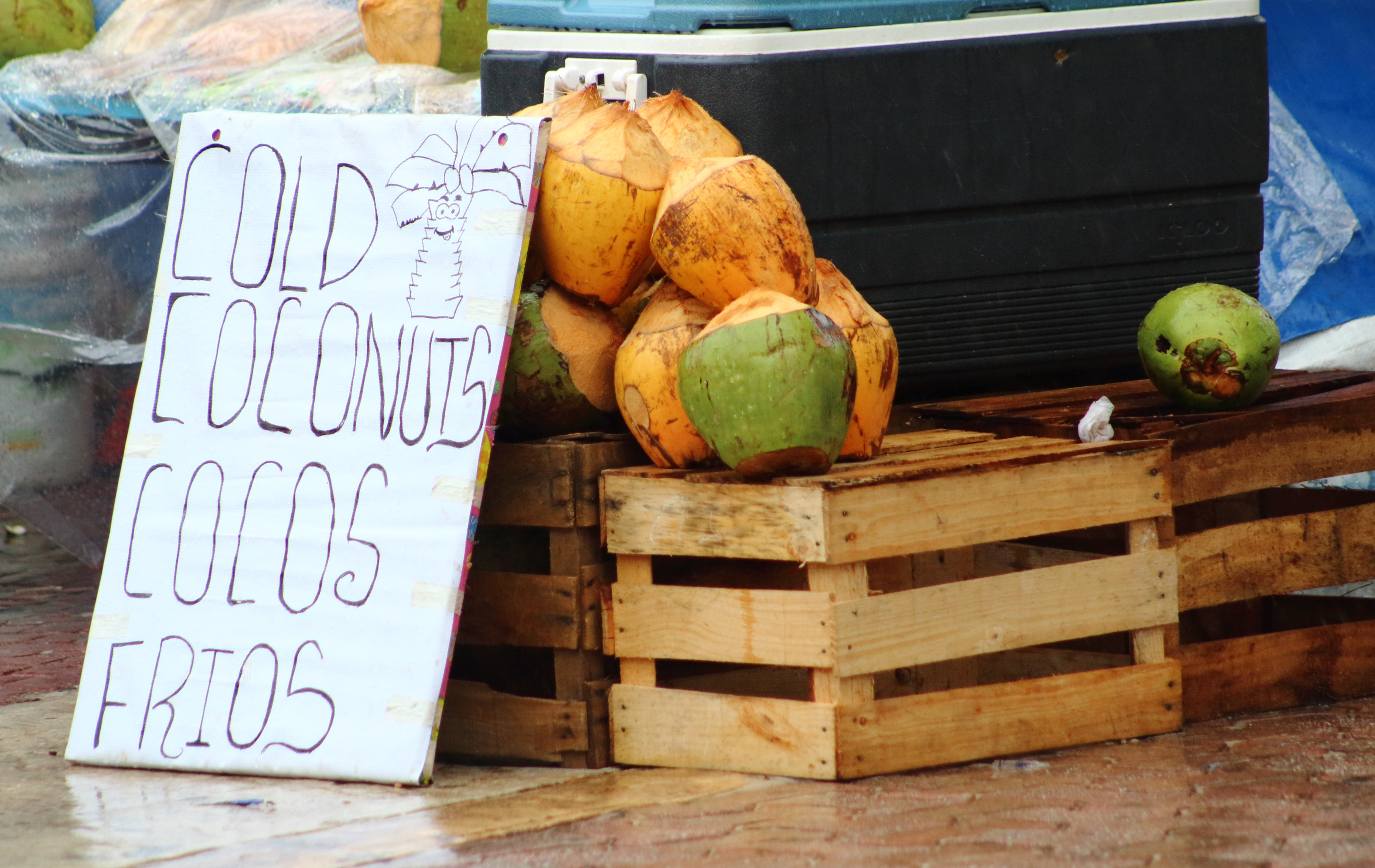 Venta de cocos en Playa del Carmen, Quintana Roo.